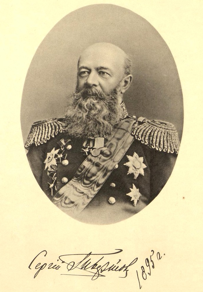 Тыртов, Сергей Петрович